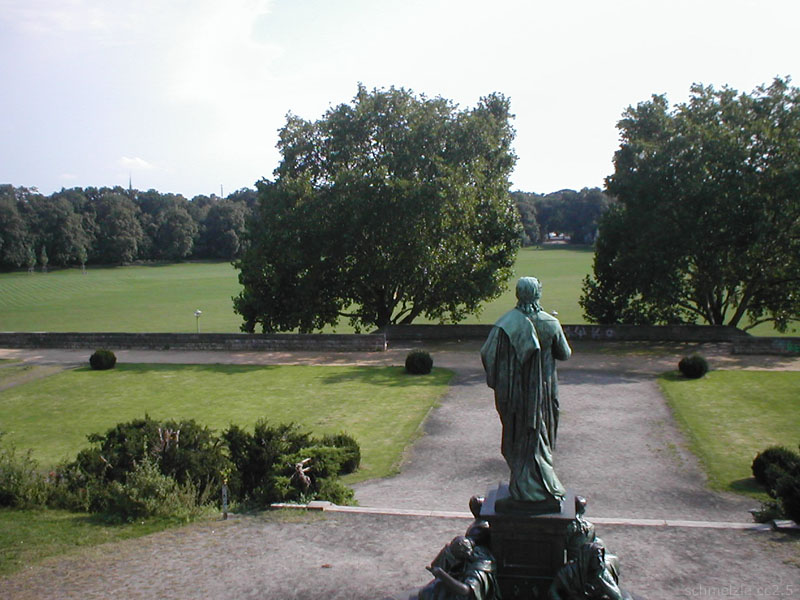 Schillerpark in Berlin-Wedding, Blick von der „Bastion“ auf die große Rasenfläche